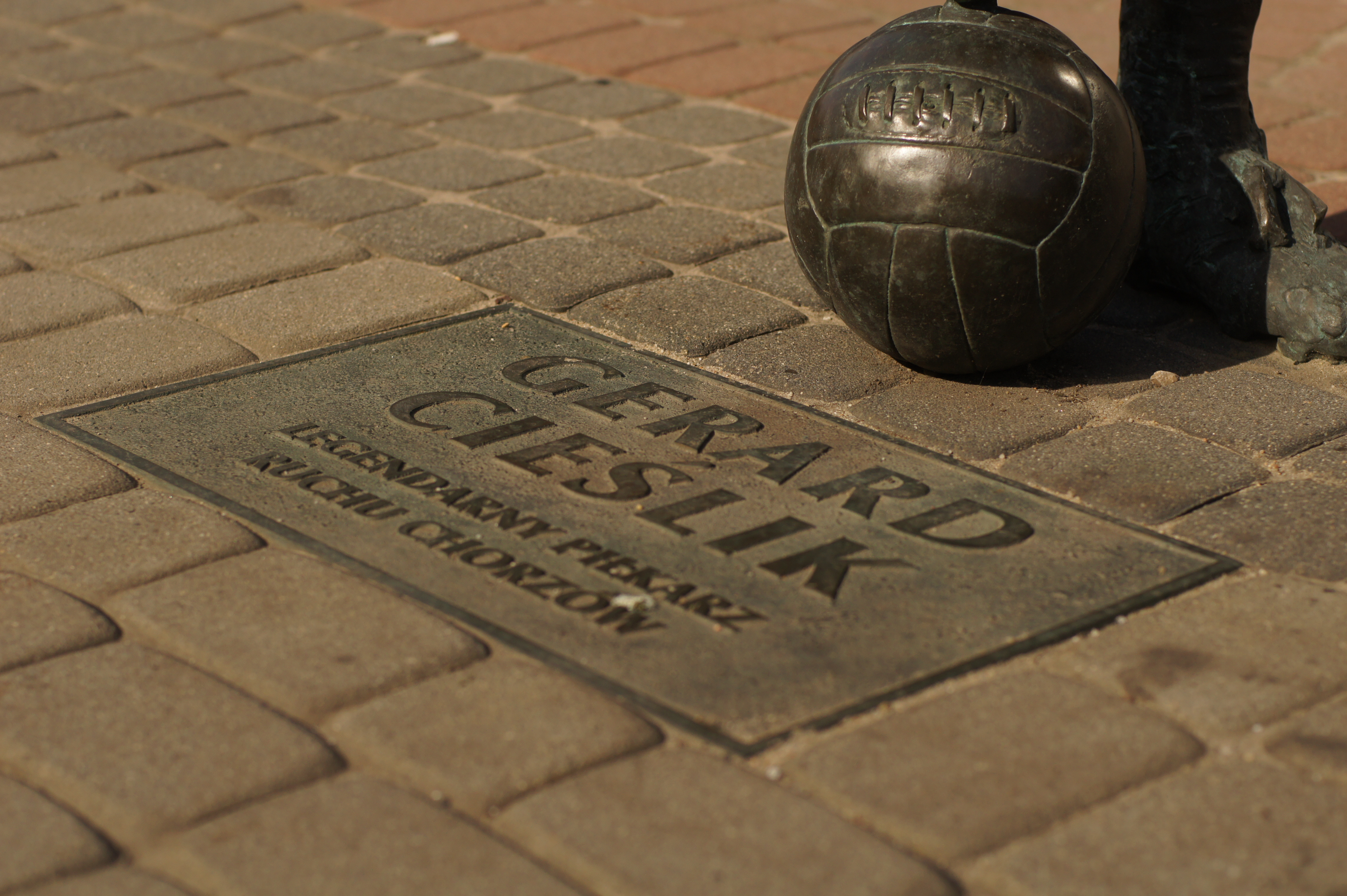 Tablica informacyjna przy pomniku Gerarda Cieślika w Chorzowie)